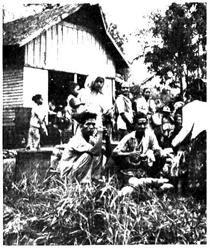 foto milik Judith Hudson saat bersama orang maanyan di Telang